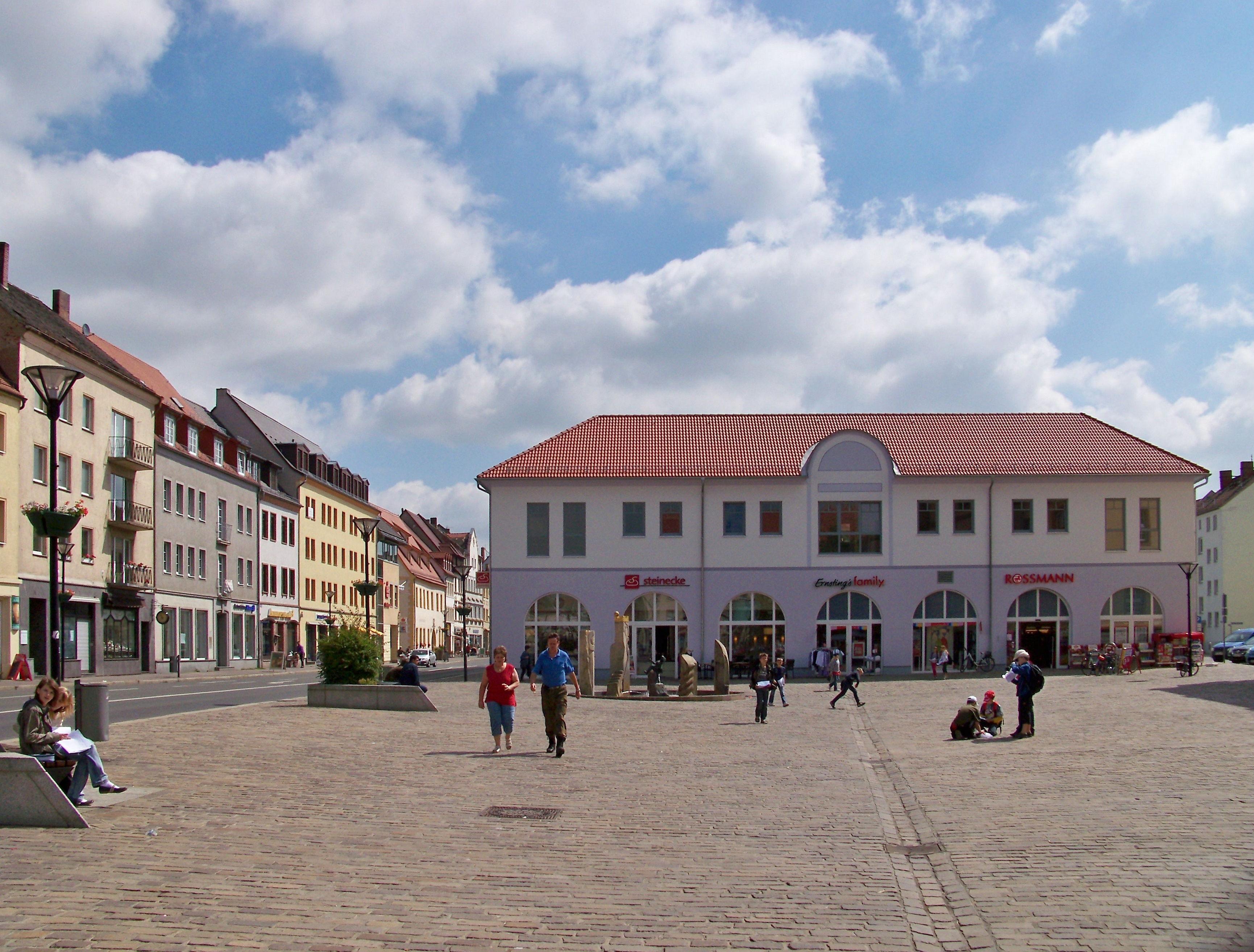 Marktplatz in Eilenburg mit dem 2008/2009 gebauten Wohn- und Geschäftshaus "Rathauscenter"